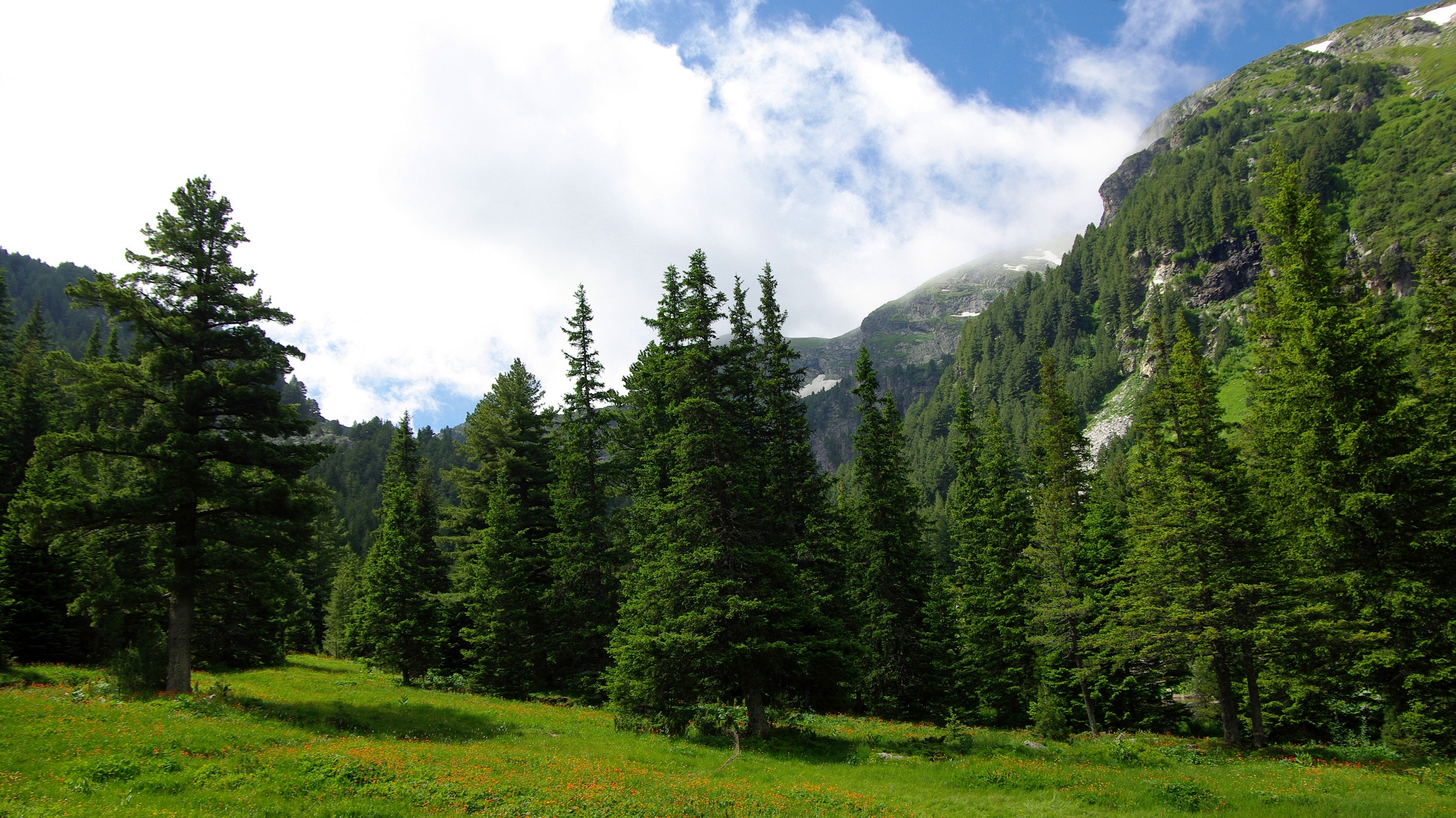 Гледка от национален парк „Рила“